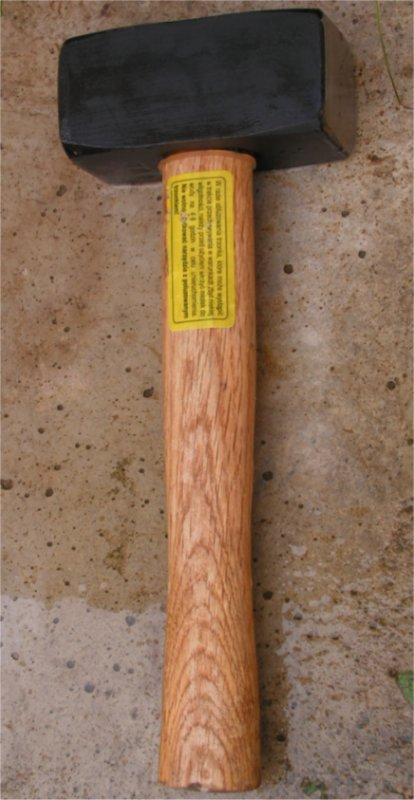 Młotek kamieniarski, autor zdjęcia: Puchatech K. (2005)